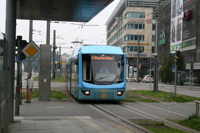 Tram in Chemnitz